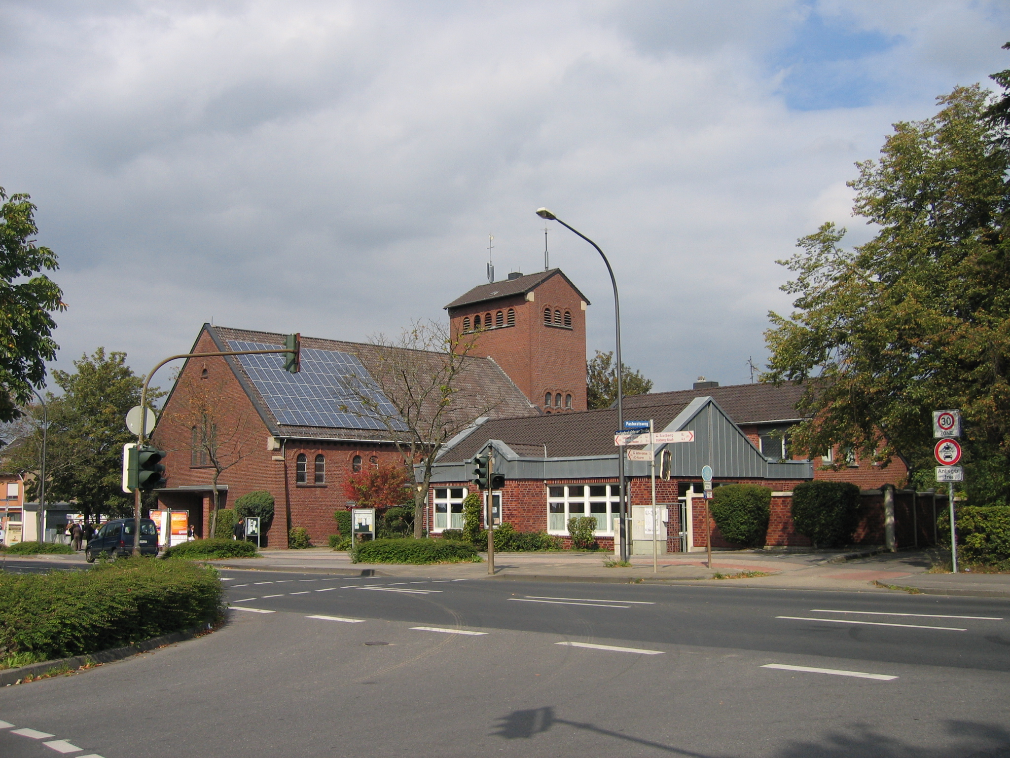 Aachen-Verlautenheide, Ortskern mit Kirche